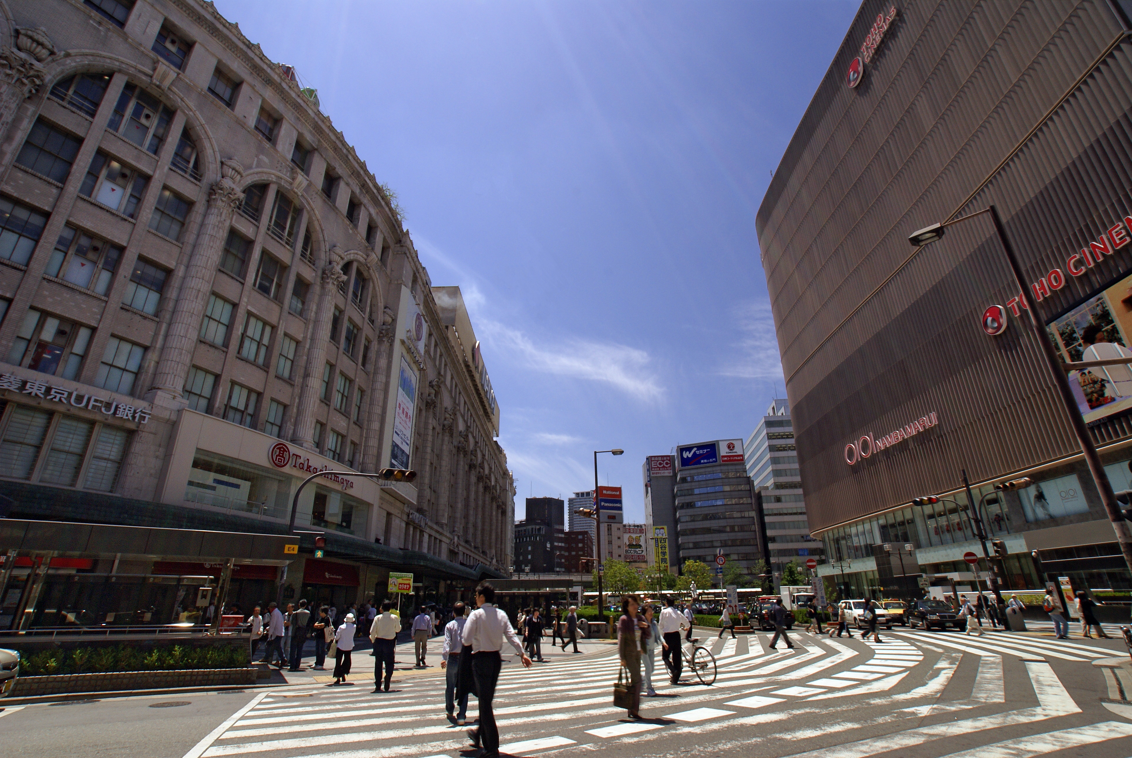 Namba ,Osaka, Osaka prefecture, Japan